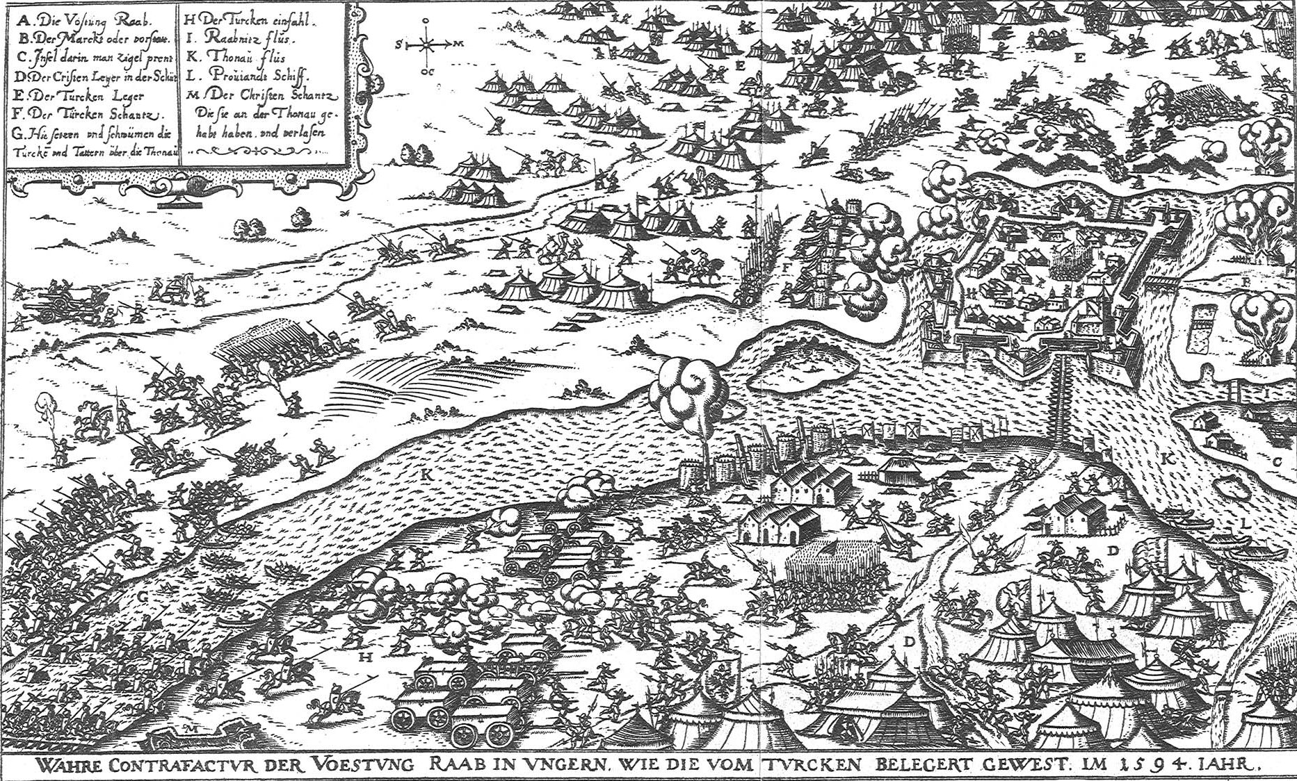 Győrt kb. 6000 fő védte, a hadműveletek első szakaszában északról, Révfalu felől egy "felmentő" keresztény sereg támogatta, amely 40-50 ezer harcosból állt.